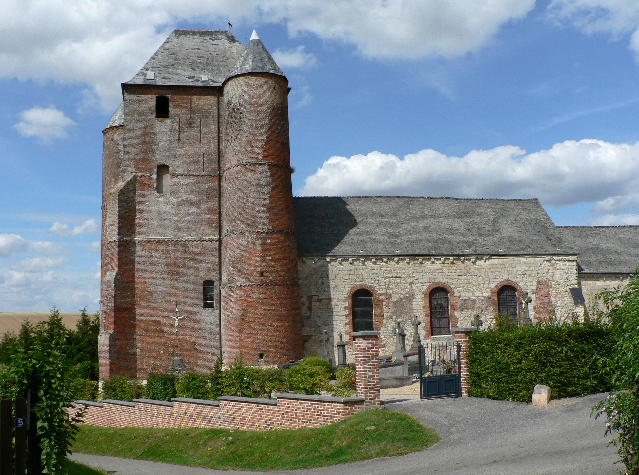 Église fortifiée de Prisces, Aisne, France